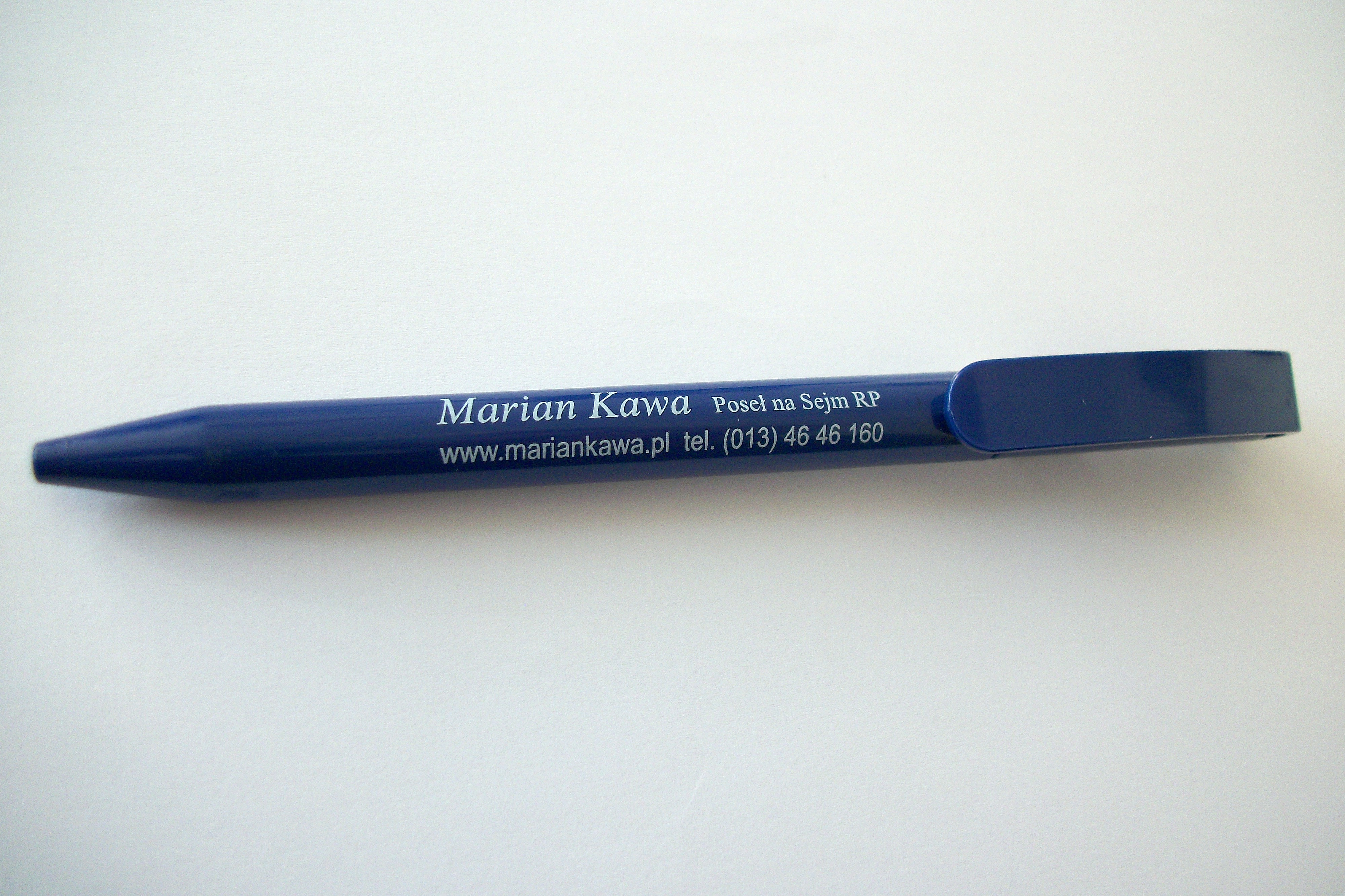 Długopis sygnowany przez posła na Sejm RP, Mariana Kawę.